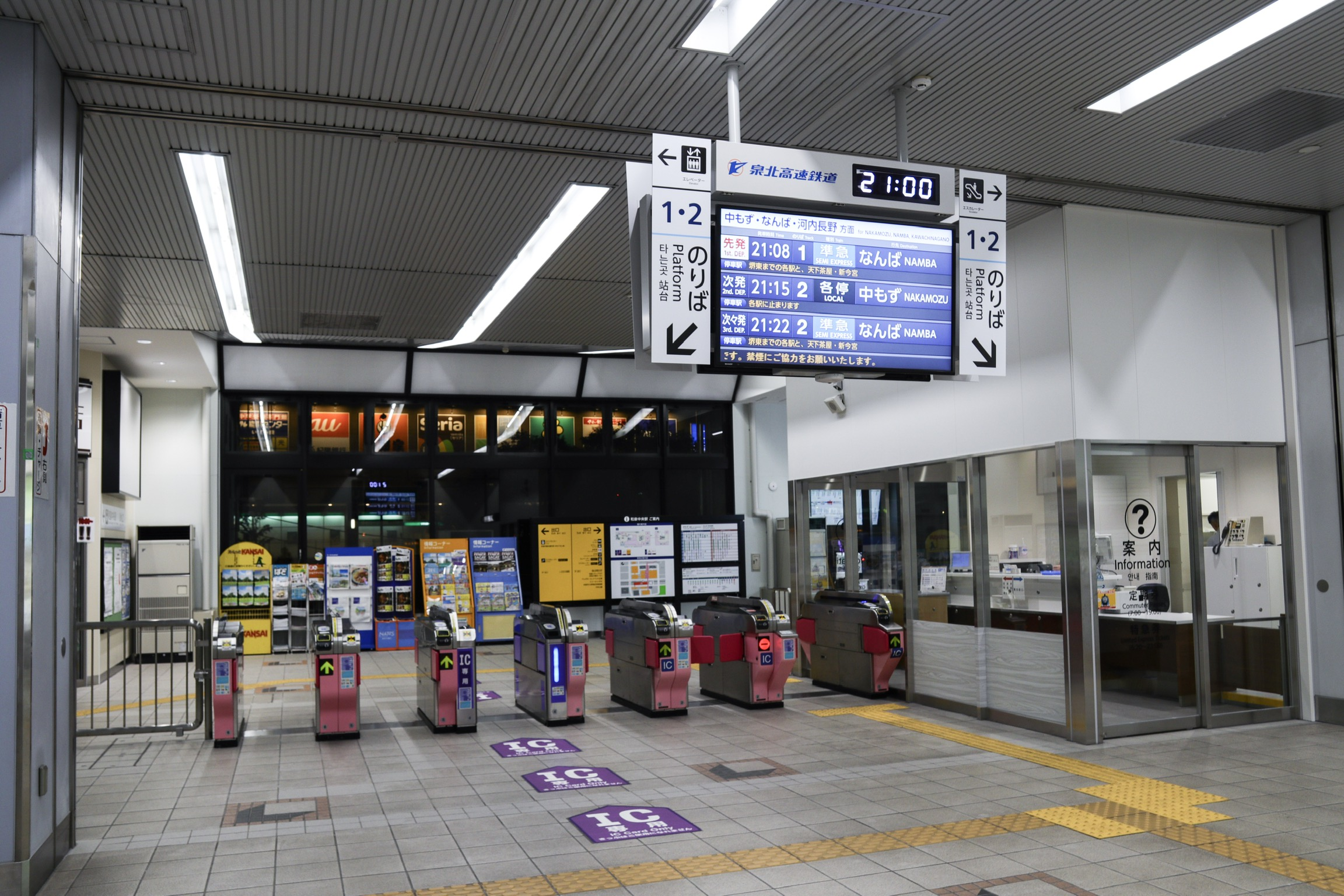 和泉中央駅 新改札（2019年移設後）